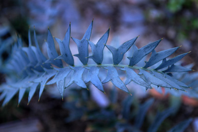 Encephalartos horridus leaf